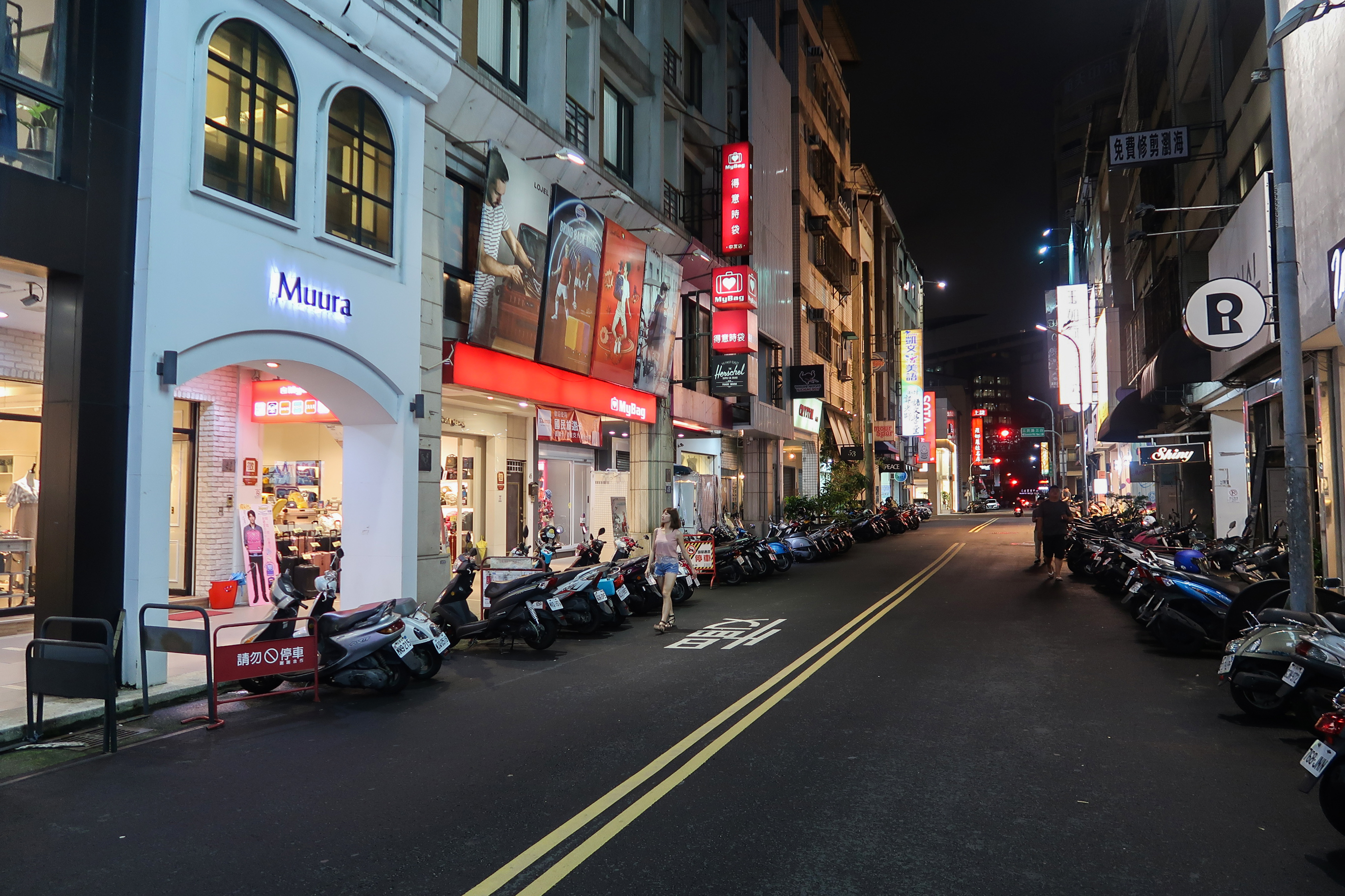 錦新街, Taichung